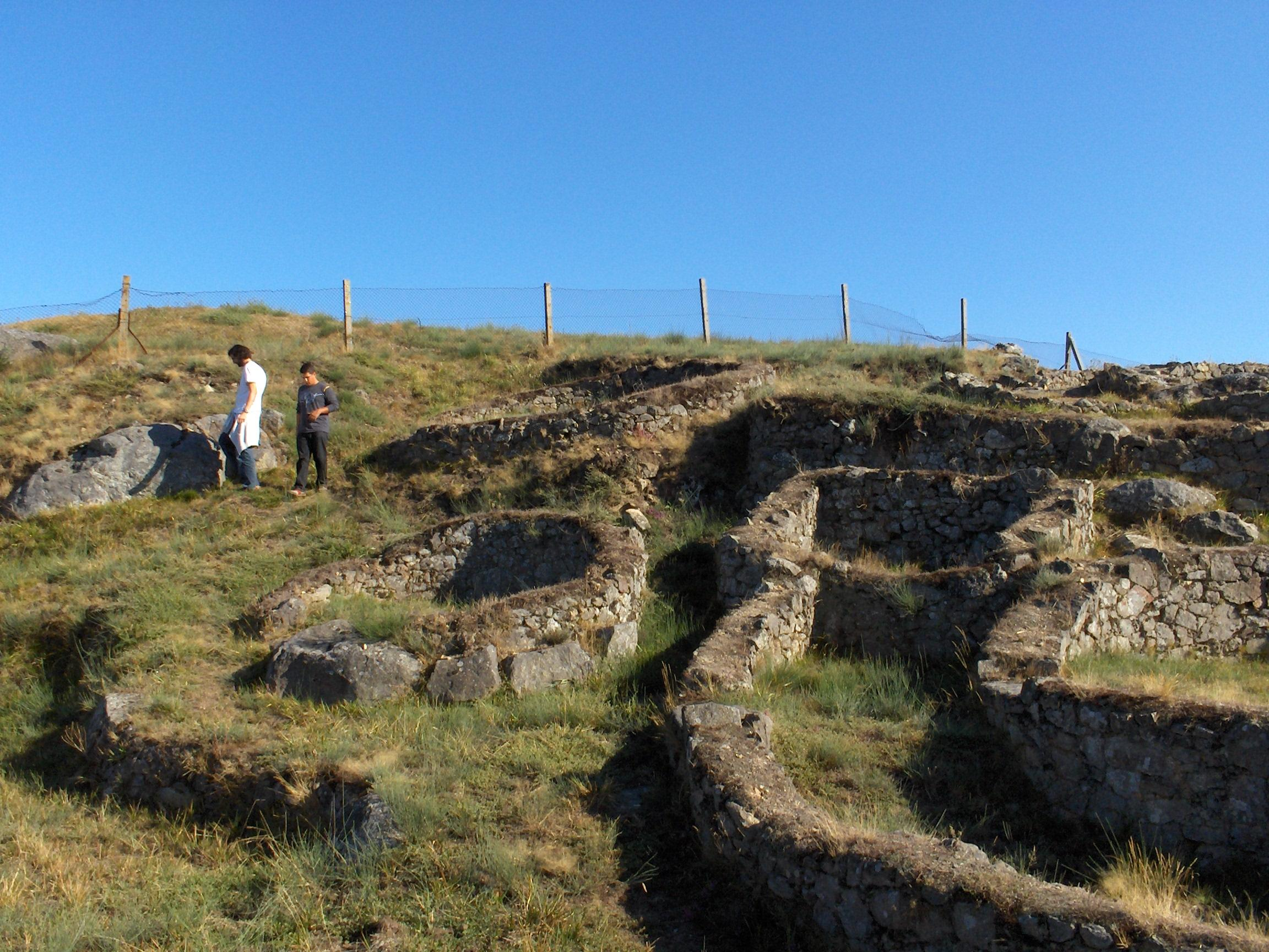 Castromao, Celanova, Galiza